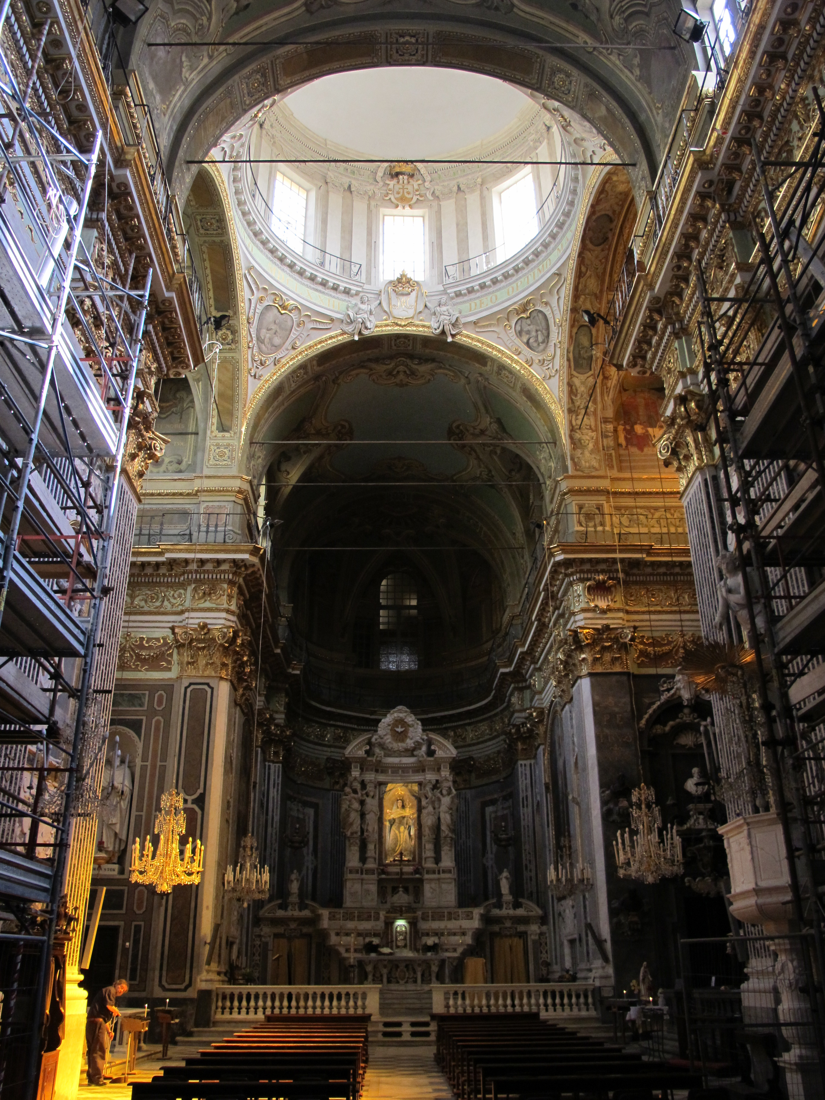 Santi Vittore e Carlo (Genova)